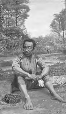 田中本吉「農夫」制作年不明 長岡市立山谷沢小学校蔵